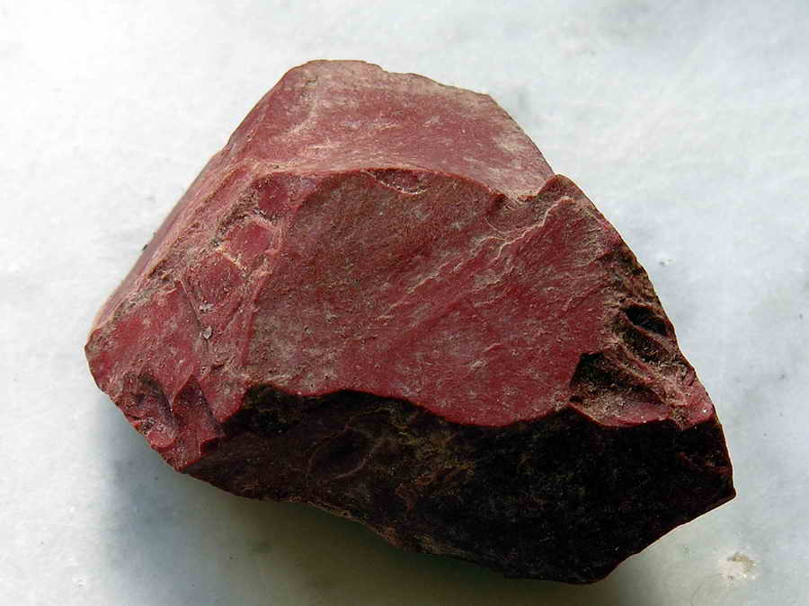 mineral. Nikon E-8800